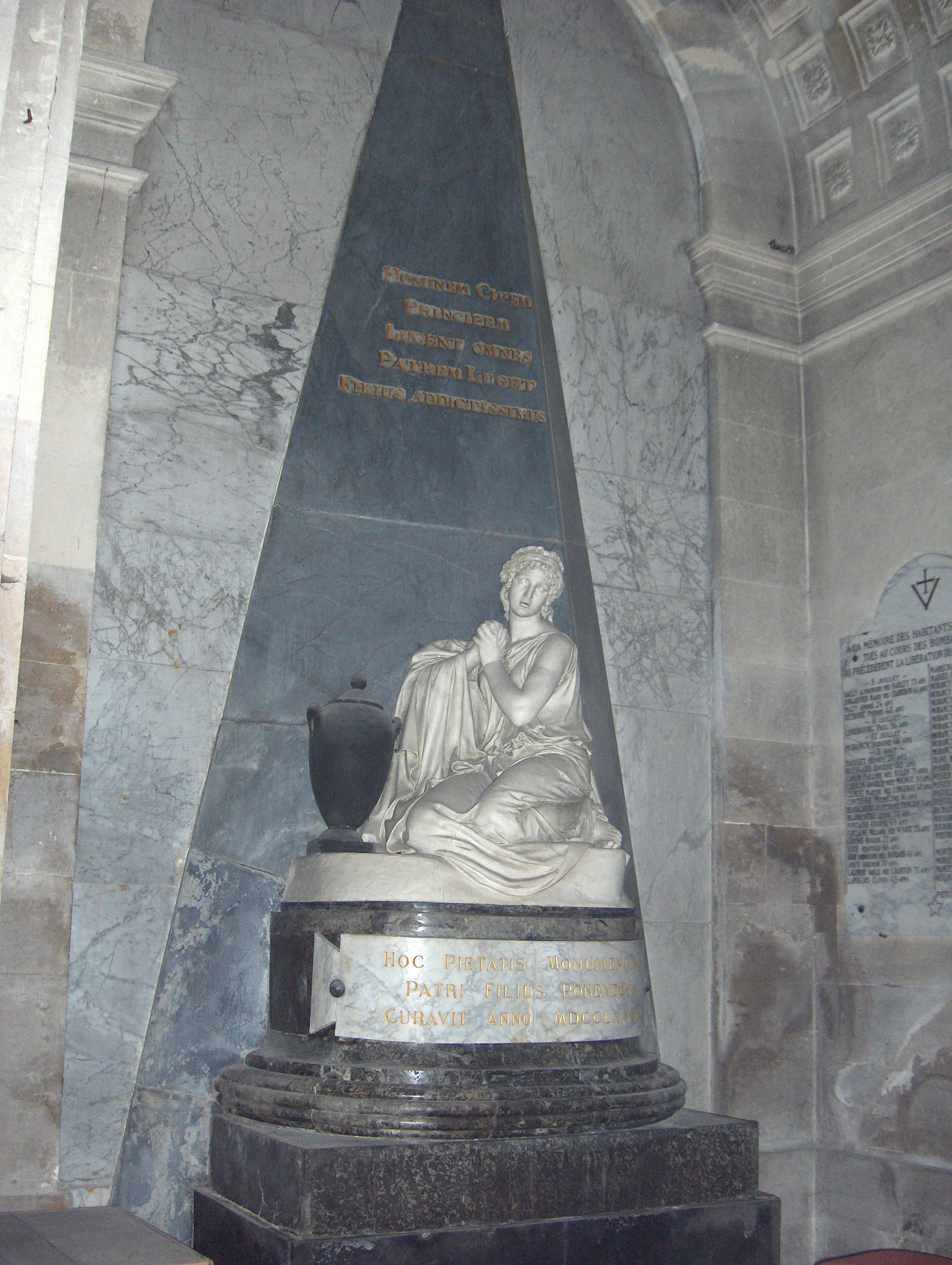 Monument funéraire classé de Louis François de Bourbon 1717-1776 (L'Isle-Adam, Val-d'Oise, église saint Martin)